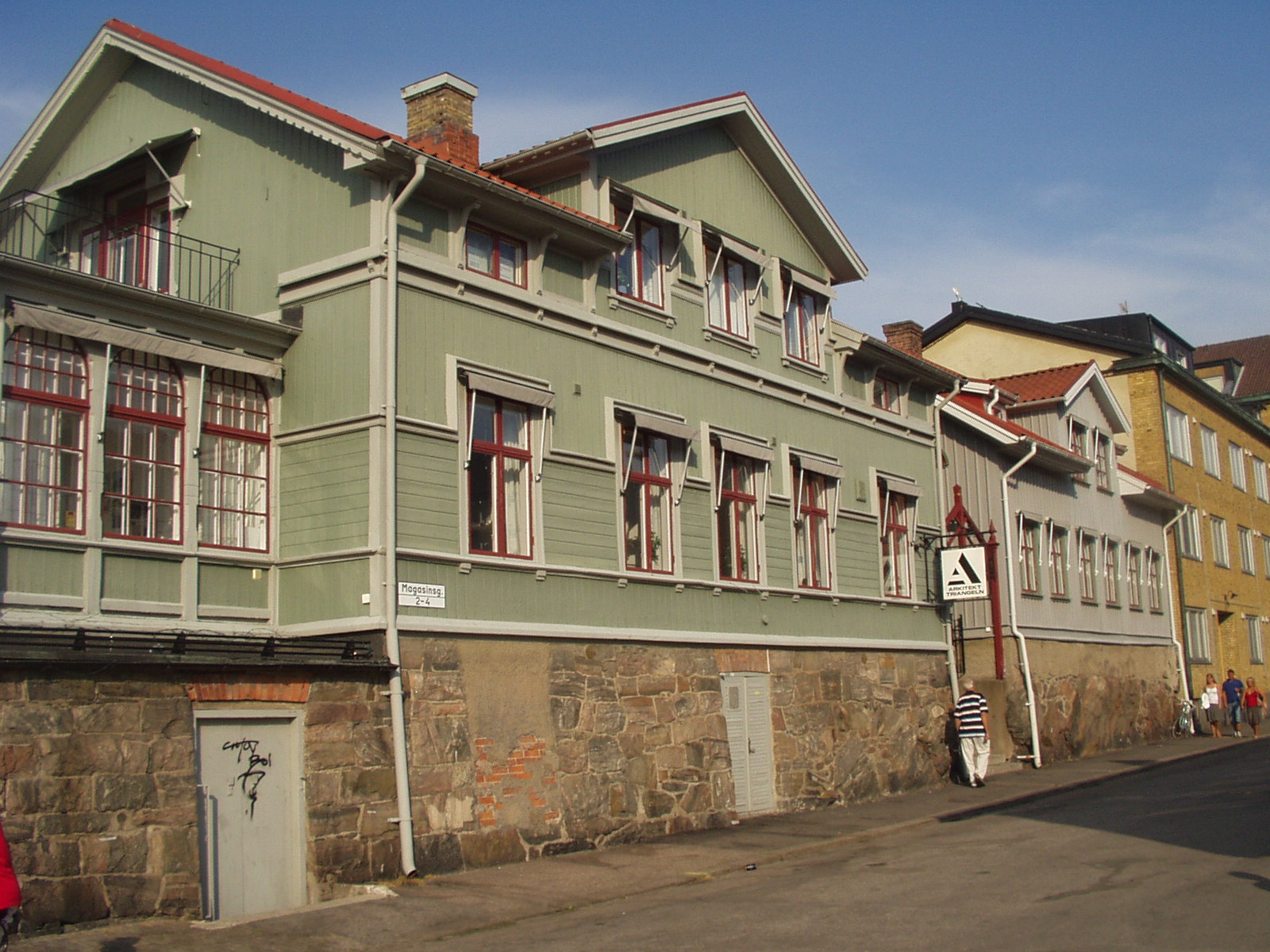 Beskrivning: Magasinsgatan 2, Trollhättan Juli 2006 Fotograf: Kristian Persson (jag själv)